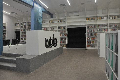 Filia nr 32 BIBLIO